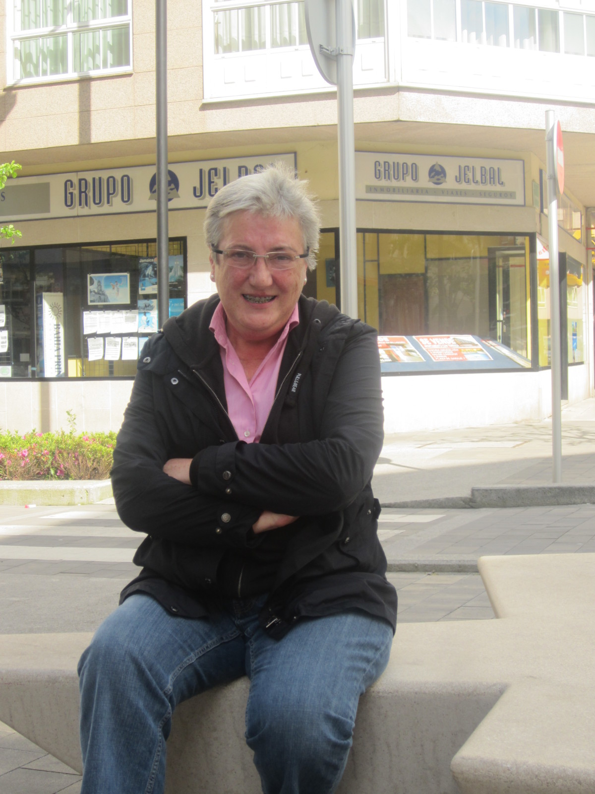 Dolores Ben nunha entrevista no 2012.